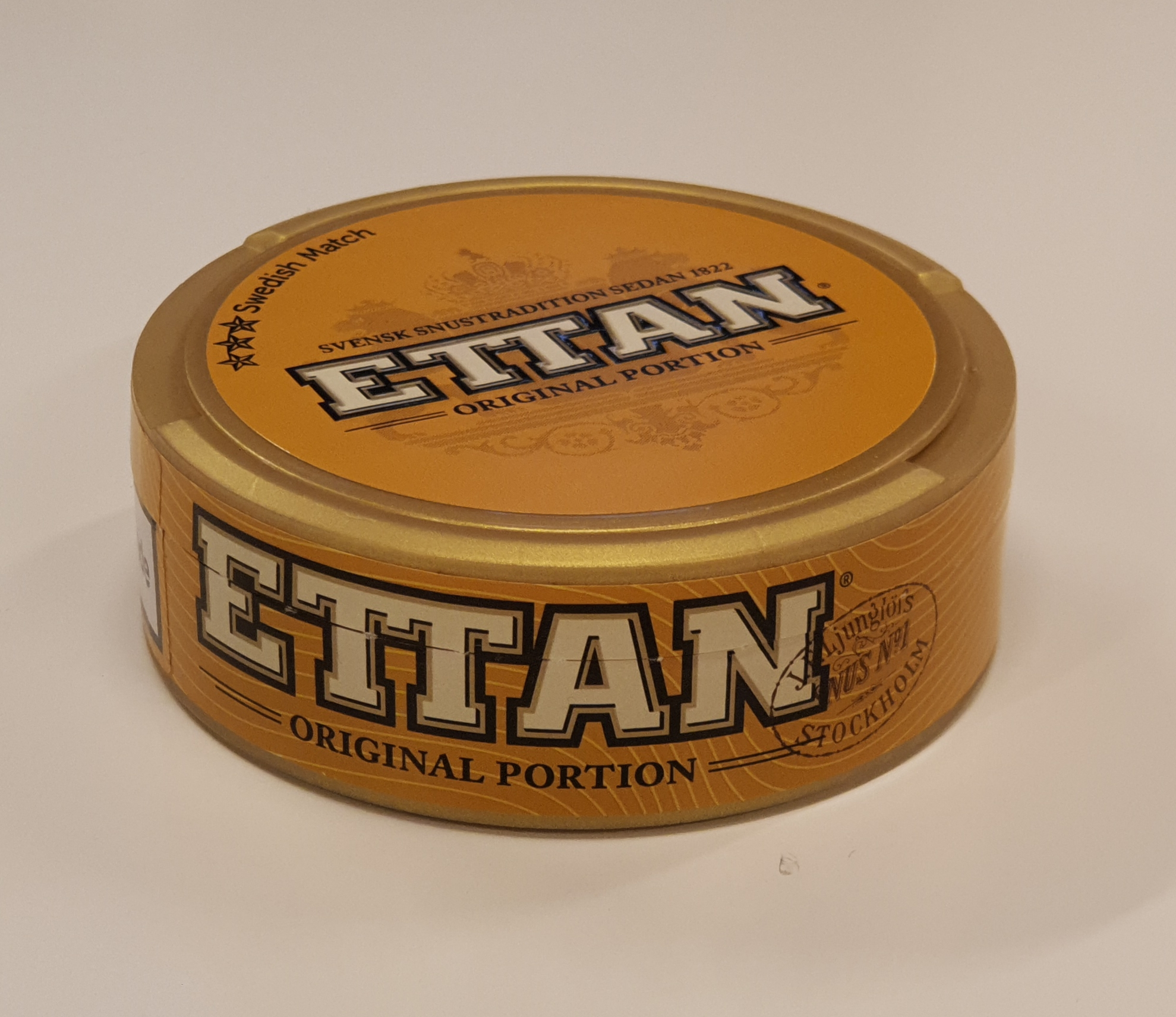 Ettans nya förpackning